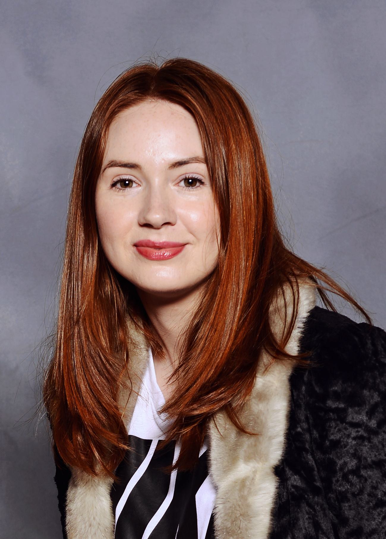 17fsca0756